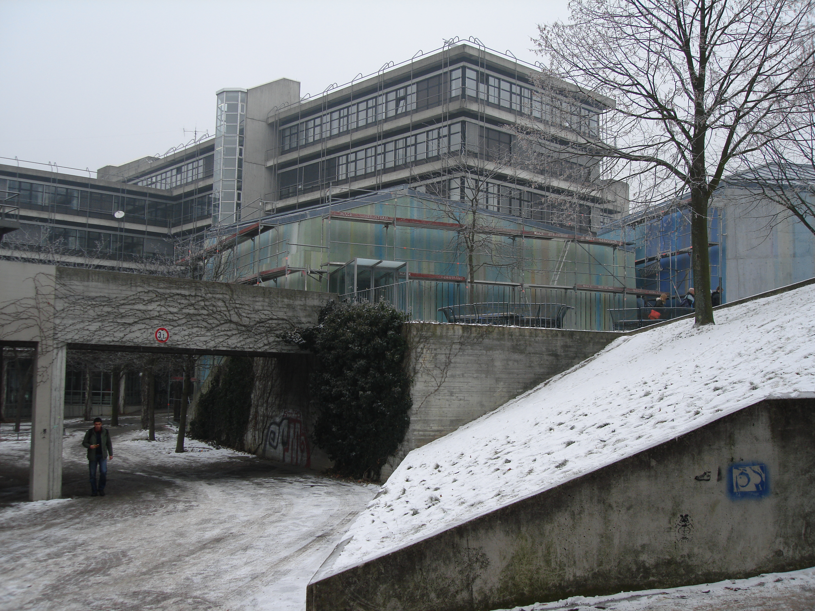 Gebäude V47, Universität Stuttgart, Vaihingen date: 03.02.2006 by: Christoph Hoffmann